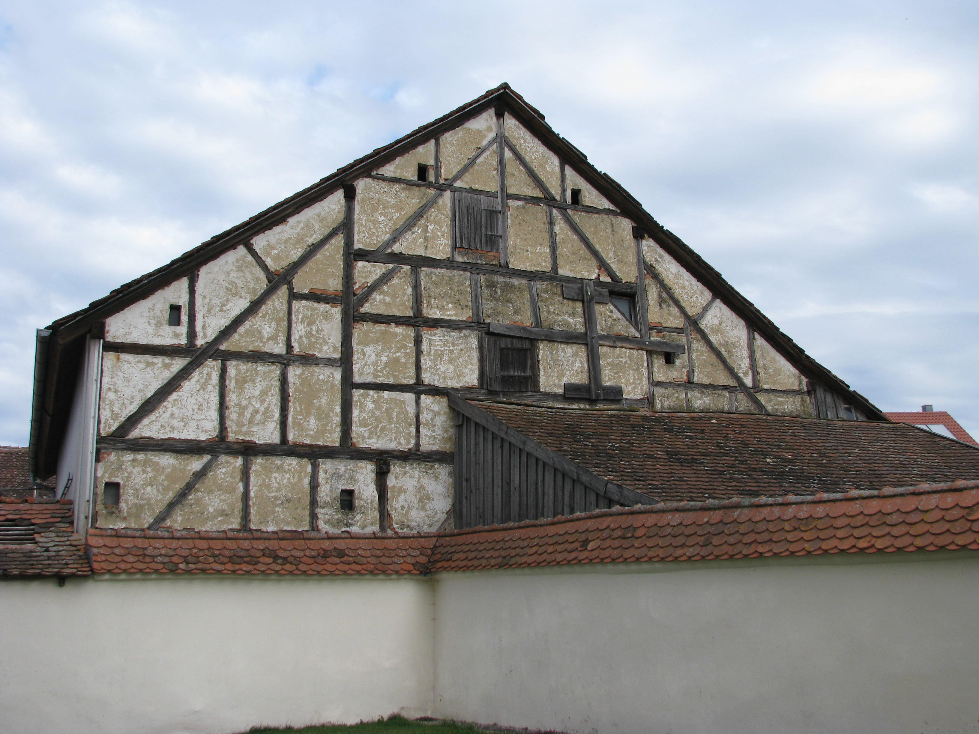 Landerzhofen, Ortsteil von Greding im Landkreis Roth, Fachwerkstadel bei der Kirche